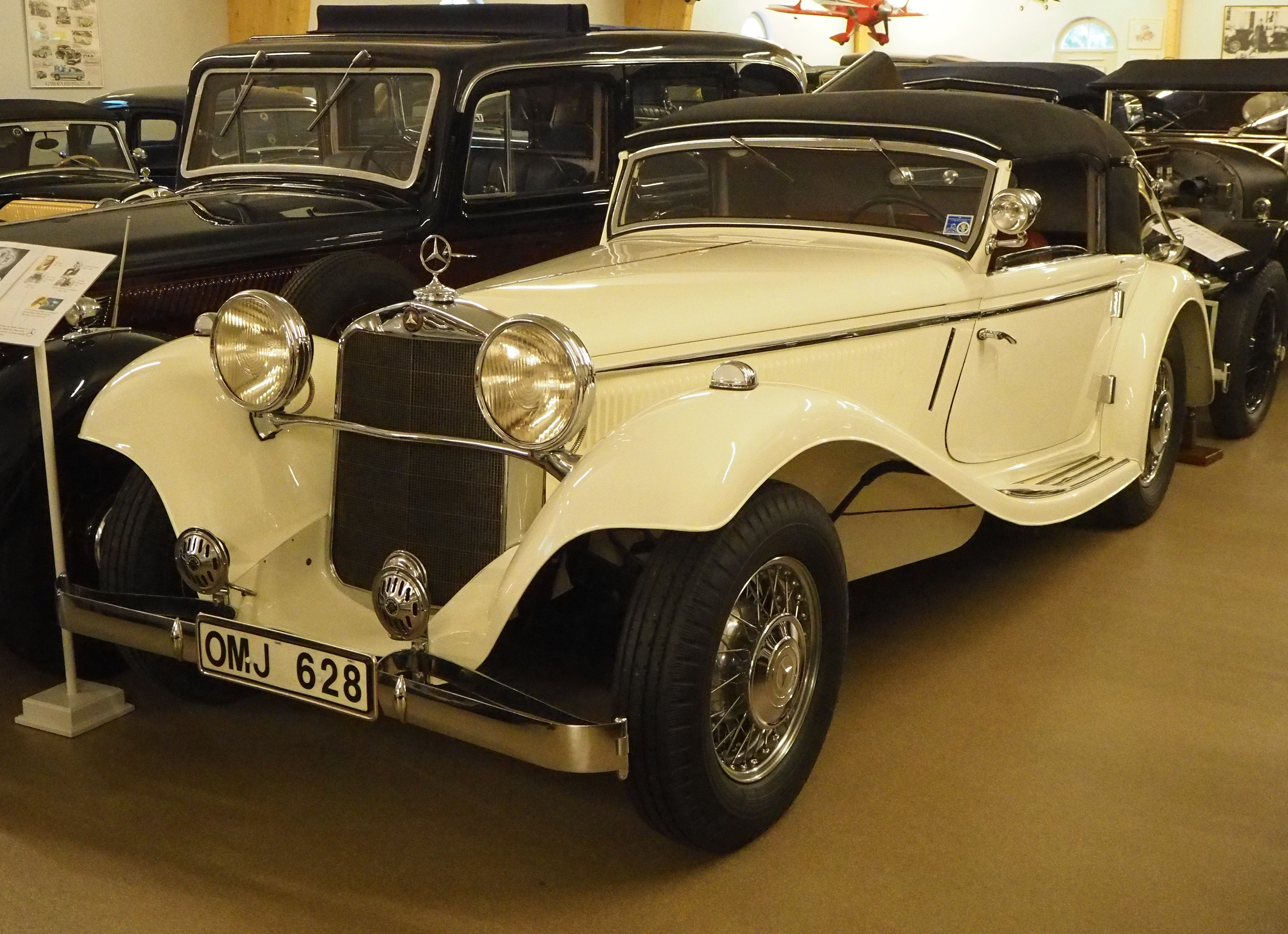 1934 Mercedes-Benz 290 Cabriolet A